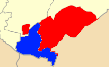 Χάρτης των ενοτήτων (και πρώην δήμων) από τις οποίες αποτελείται ο Δήμος Σουφλίου. Δοξάτου Καλαμπακίου